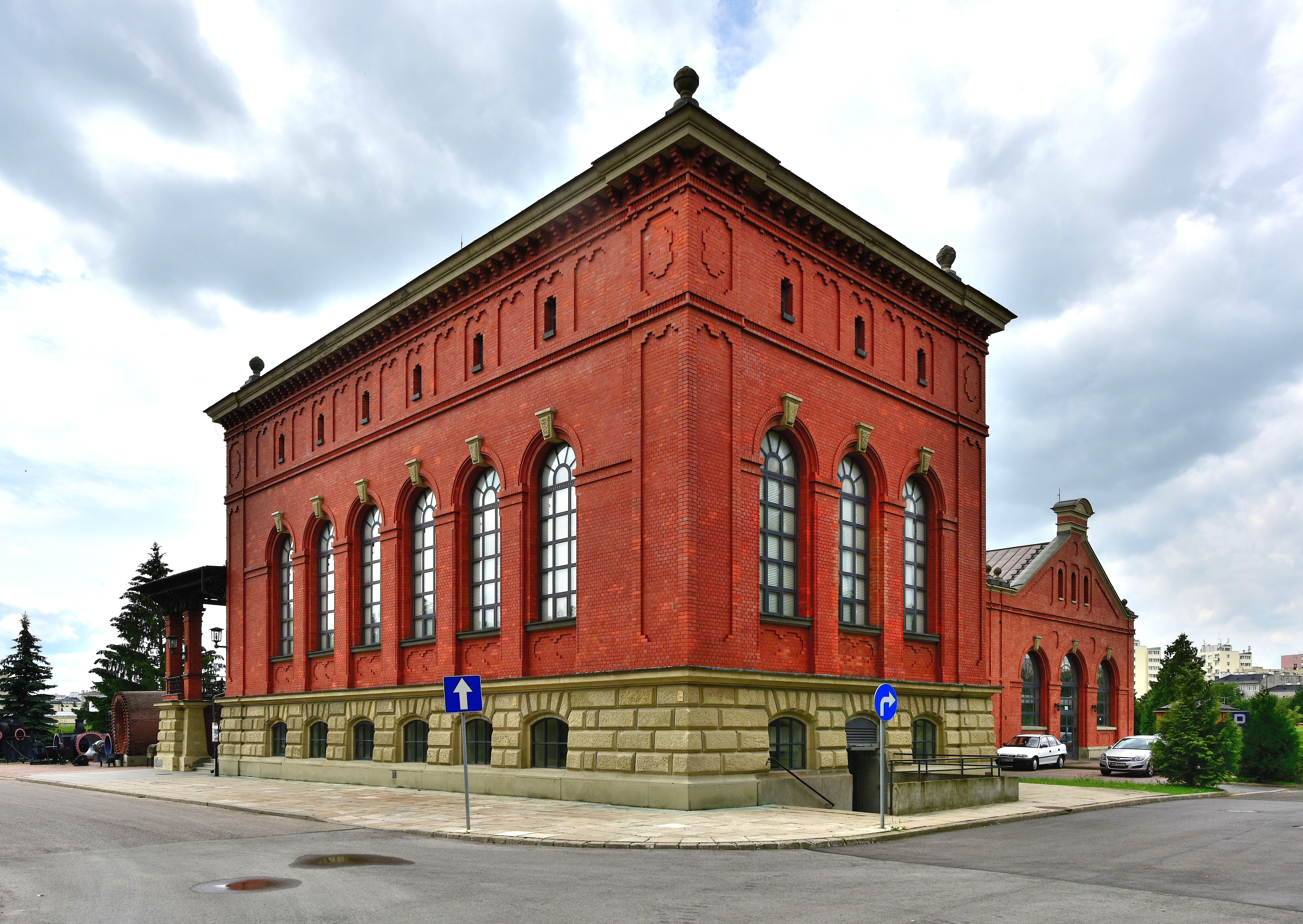 Budynek nr 2, siedziba Muzeum Wodociągów i Kanalizacji. Zespół Stacji Filtrów przy ul. Koszykowej 81 w Warszawie